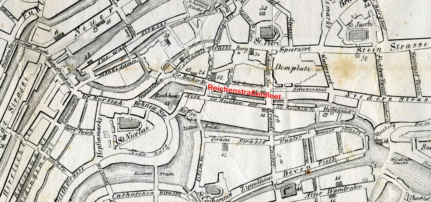 Hafen und Elbe bei Hamburg 1813/1814